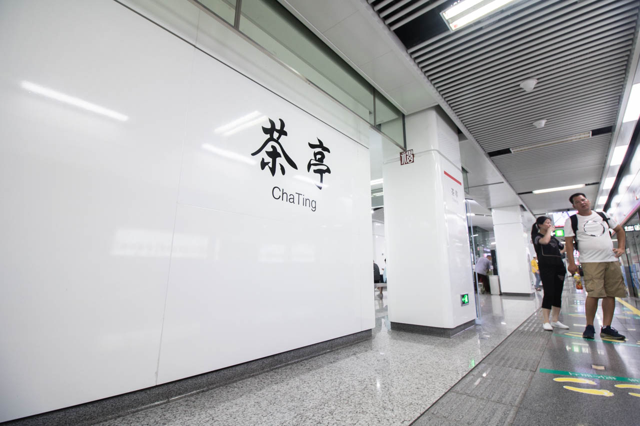 中文（中国大陆）: 福州地铁1号线茶亭站